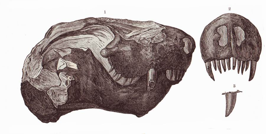 Череп арктогната